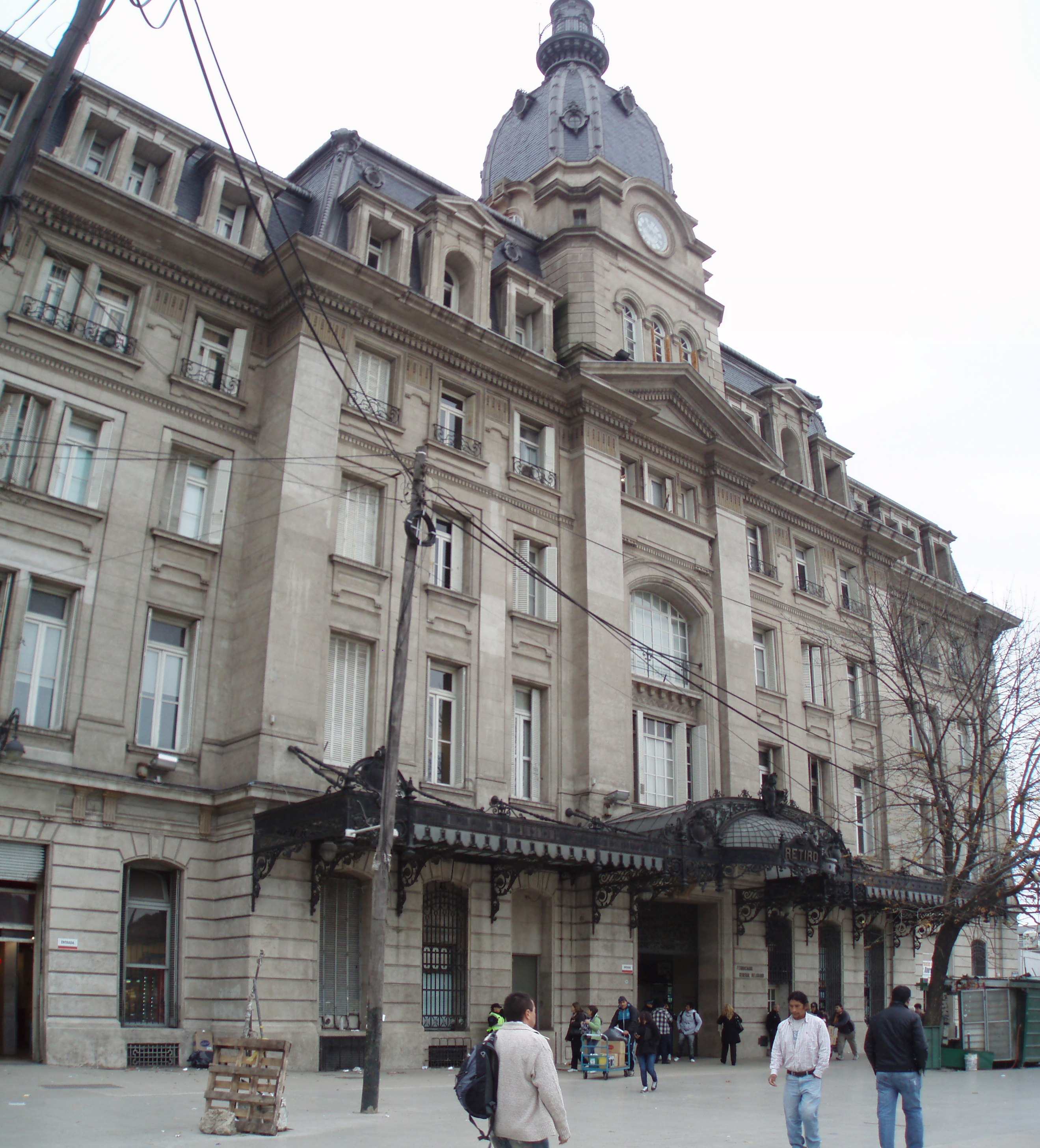 Fachada de la Estación Retiro (Belgrano Norte) de Buenos Aires en 2013.